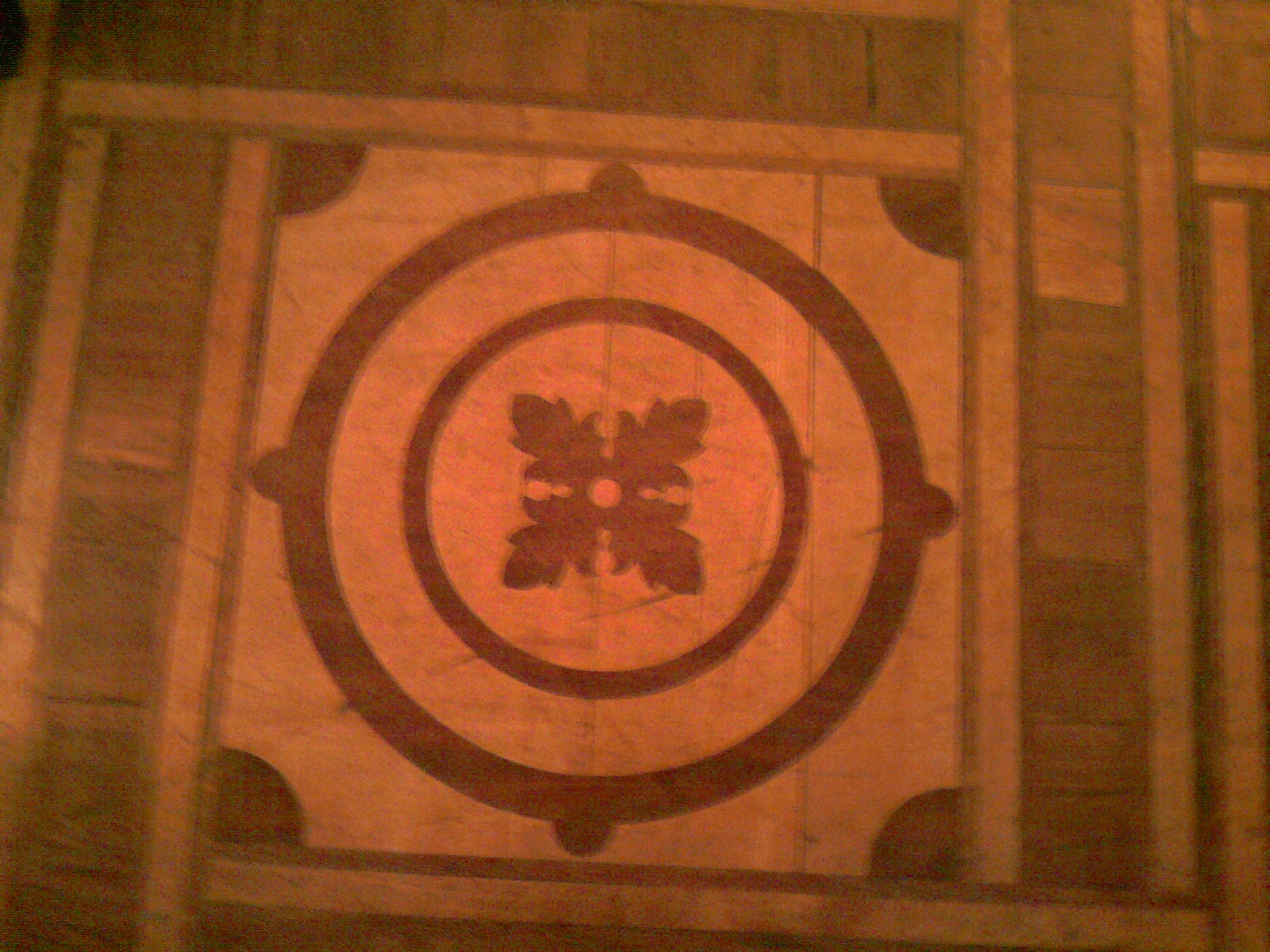 Parkiet znajdujcy sie w Kamienicy pod Gigantami majcy 250 lat. Przeniesiono go z Palacyku Tarnowskich.